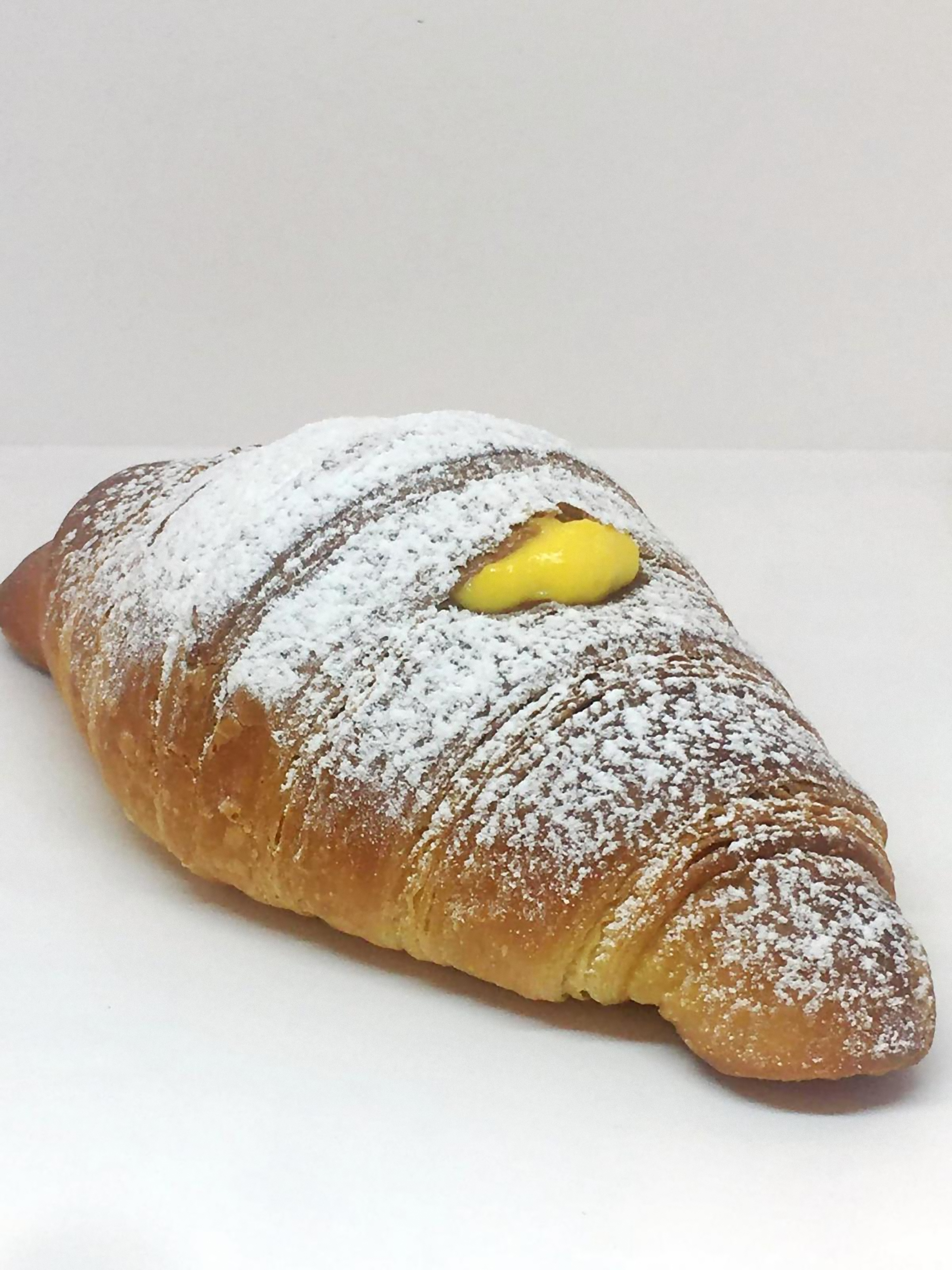 Cornetto con la crema